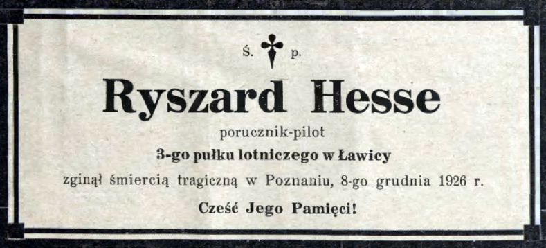 Nekrolog por. Ryszarda Hesse zamieszczony w "Lotniku" z dn. 25 grudnia 1926 r.